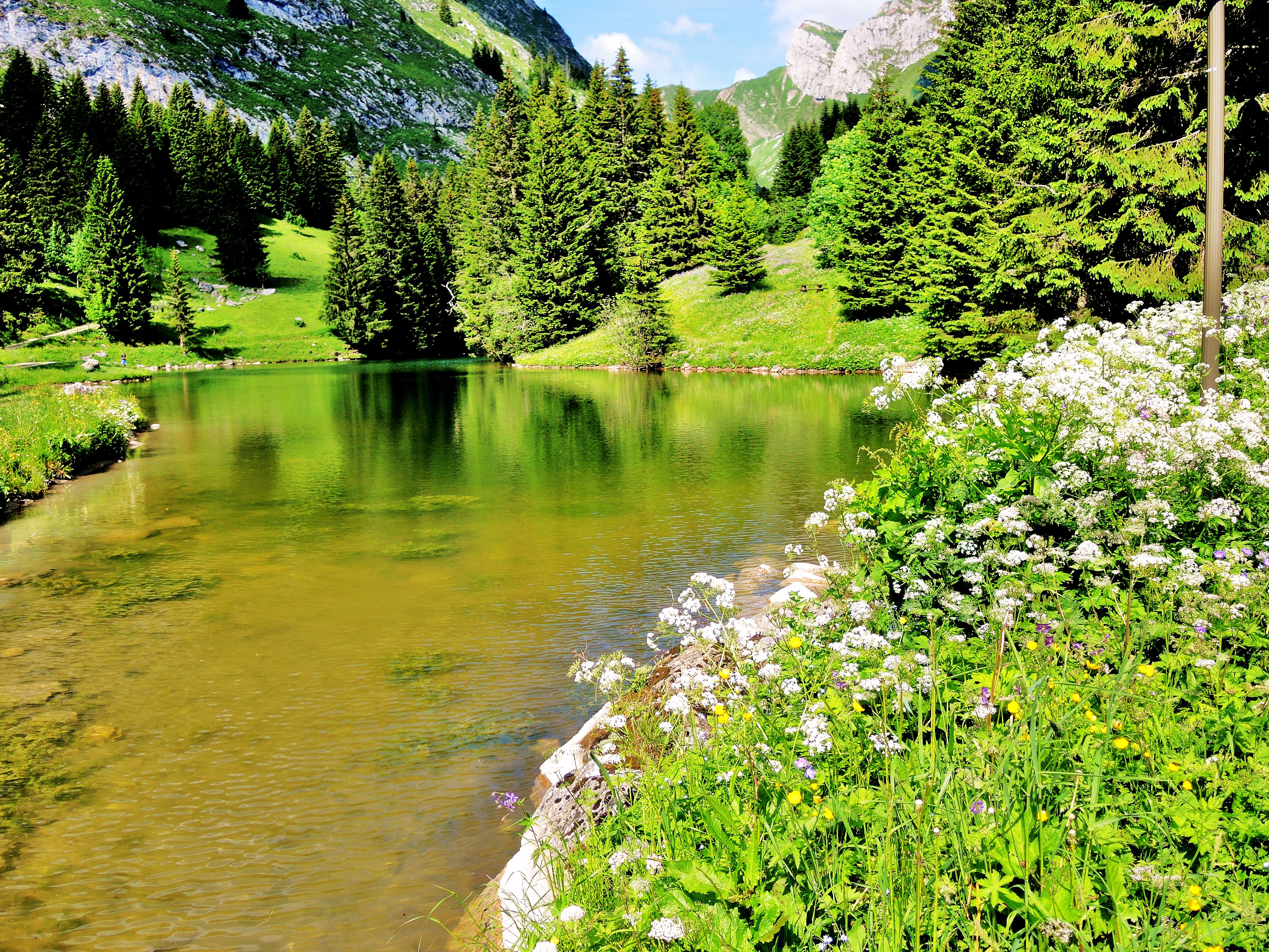 Lac de Fontaine.